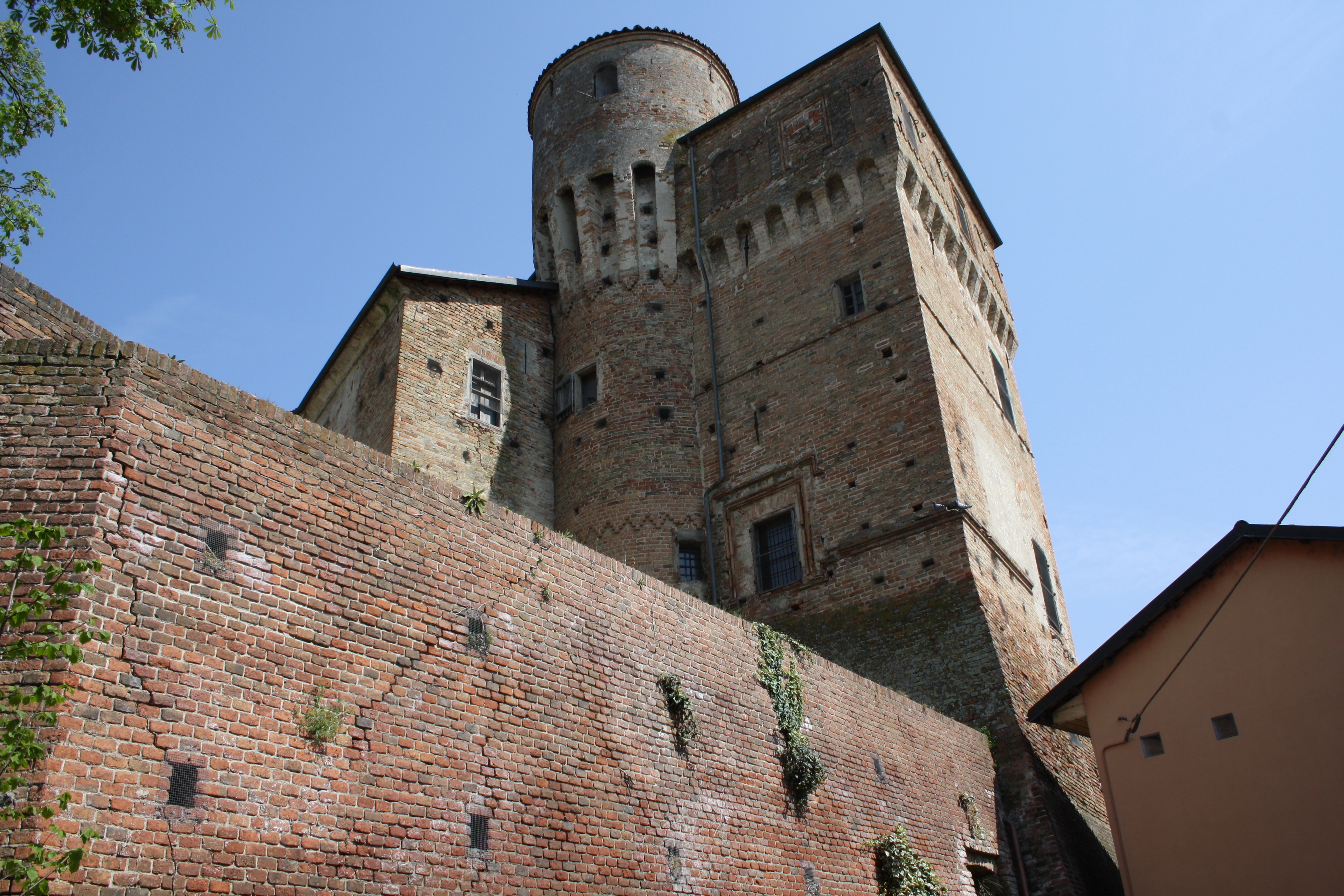 Torre circolare del castello di Roddi